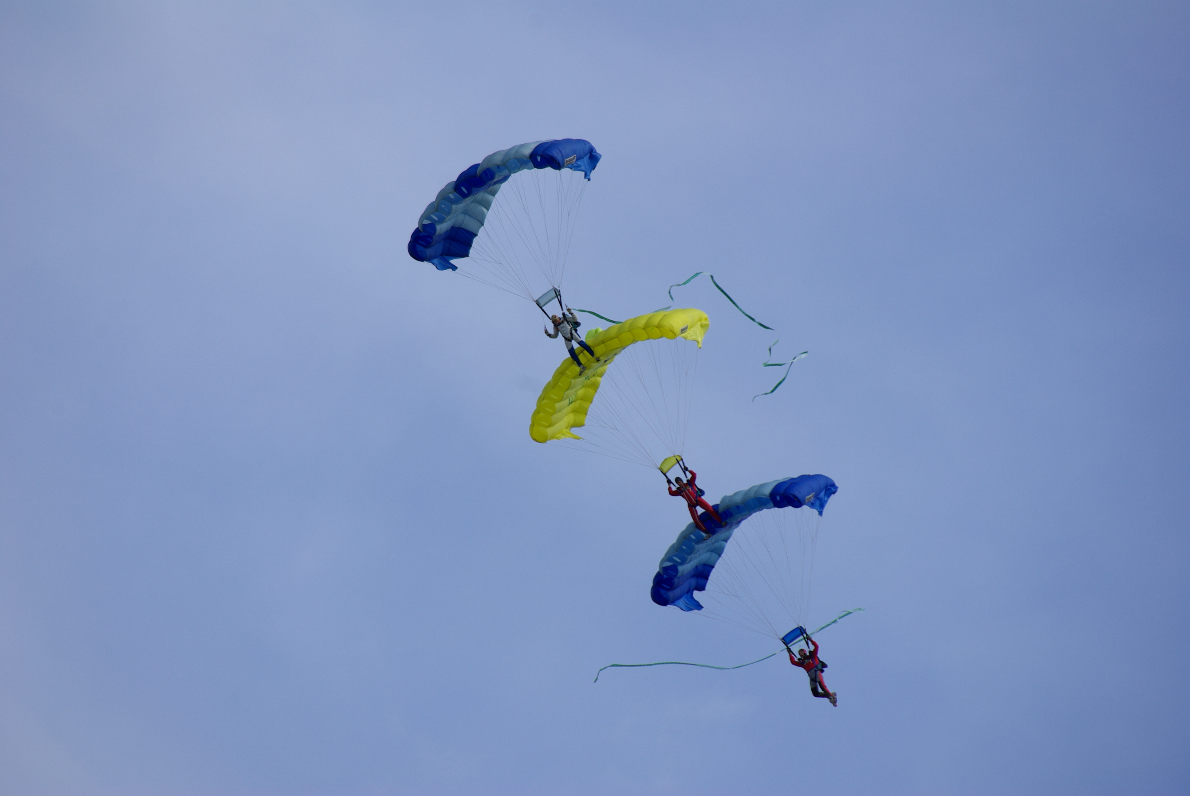 Figure de voile contact à Tours le 18 mai 2008